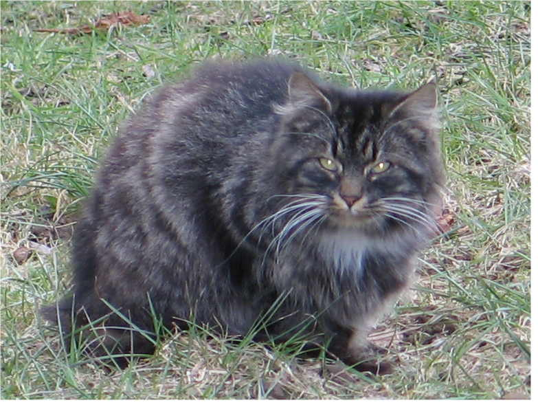 Hauskaz (Mäerz 2006)